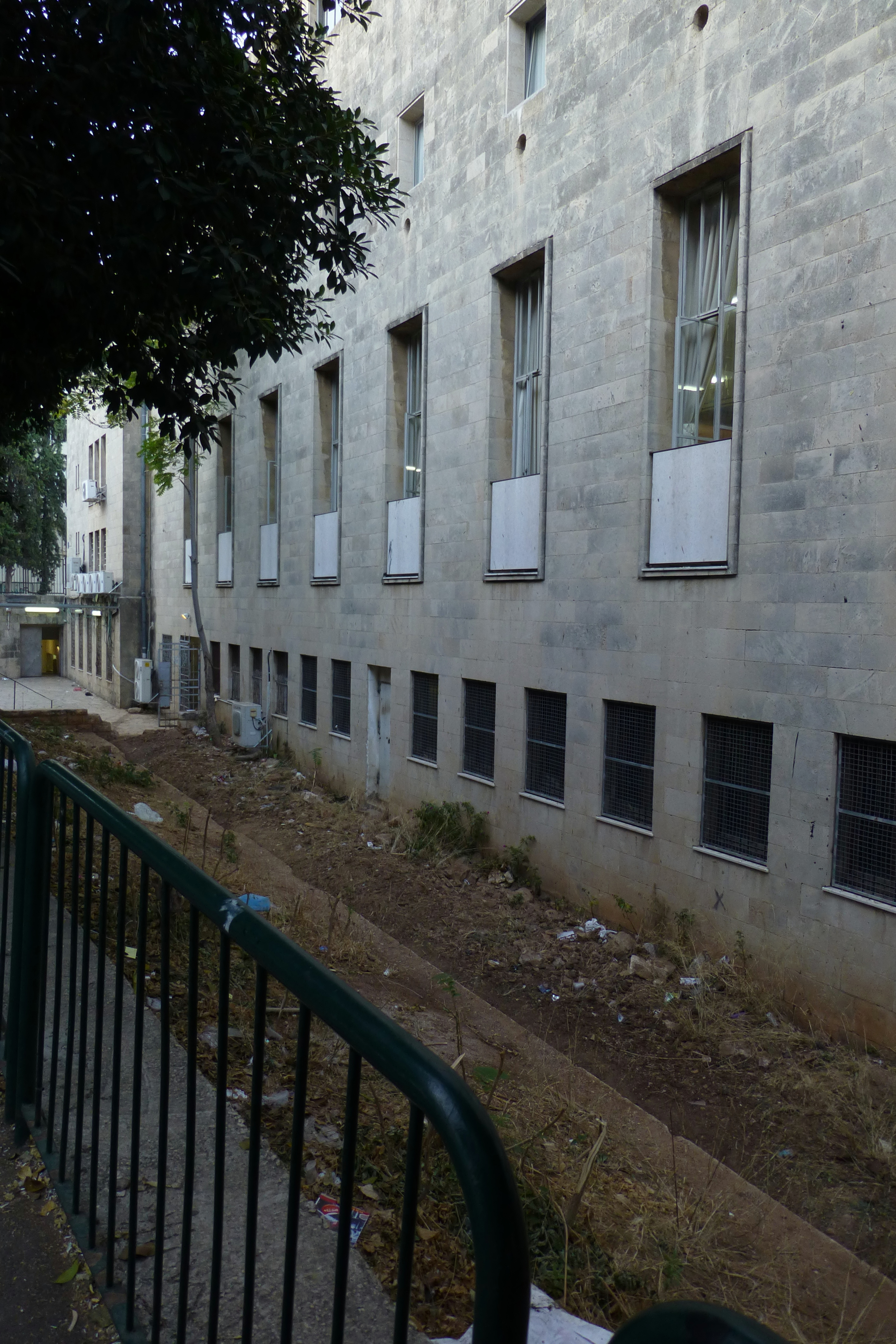 בית הכנסת הגדול של חיפה, רח' הרב הרצוג 5